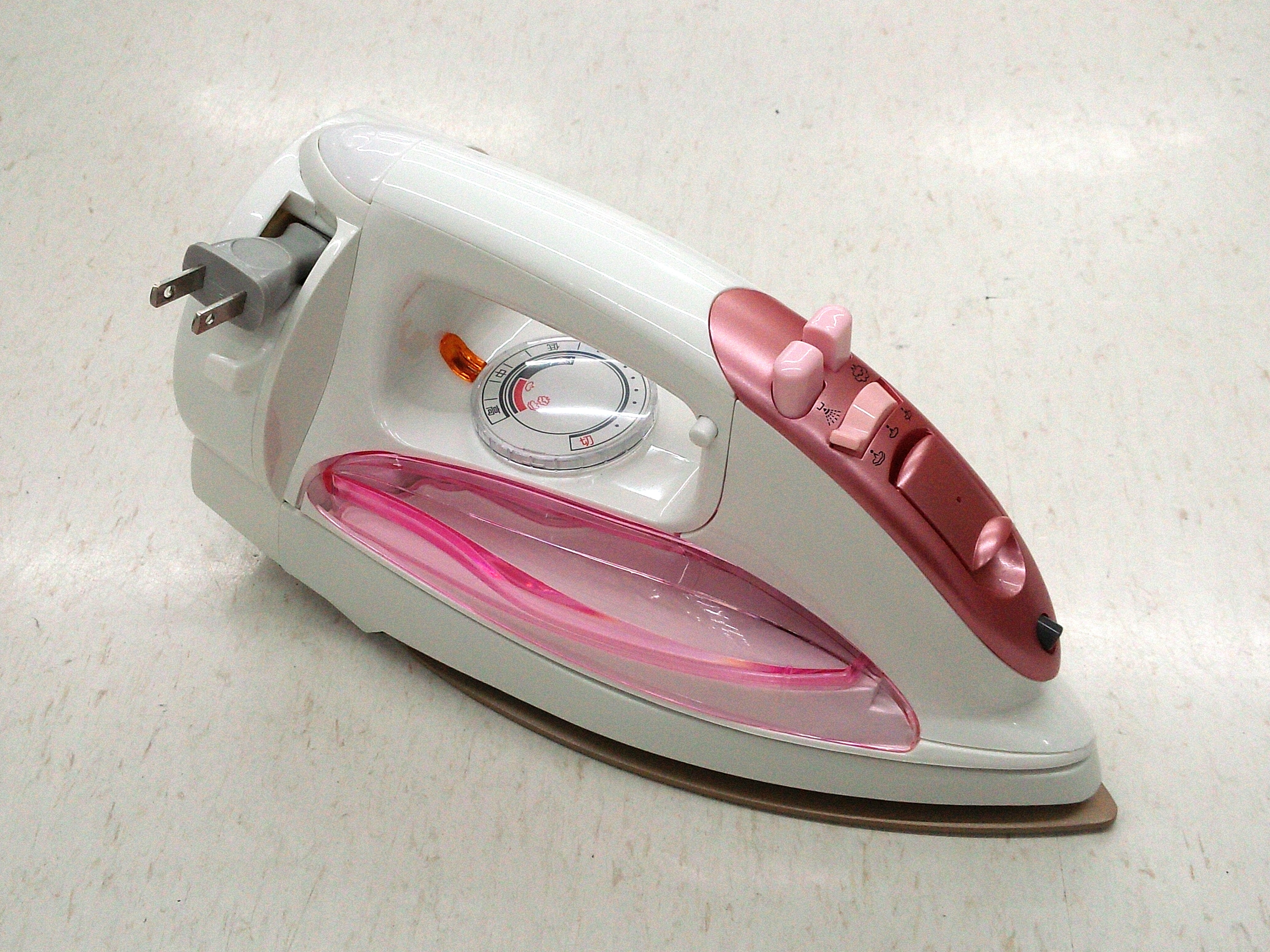 アイロン「NI-R36-P」（パナソニック製）